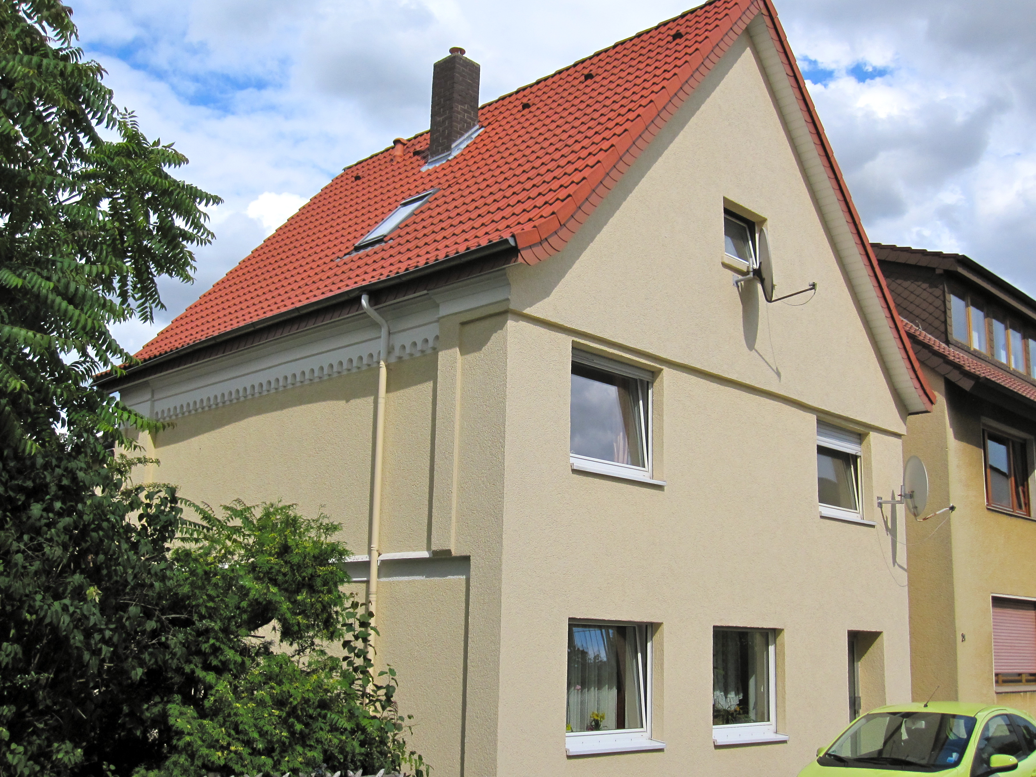 Ehemalige Synagoge in der Aechternstraße Nr. 19 in Schötmar / Bad Salzuflen. Inder Pogromnacht durch Brandstiftung zerstört. Heute als Wohnhaus genutzt. Man erkennt heute noch die Verzierung an der Seitenwand unter der Dachtraufe